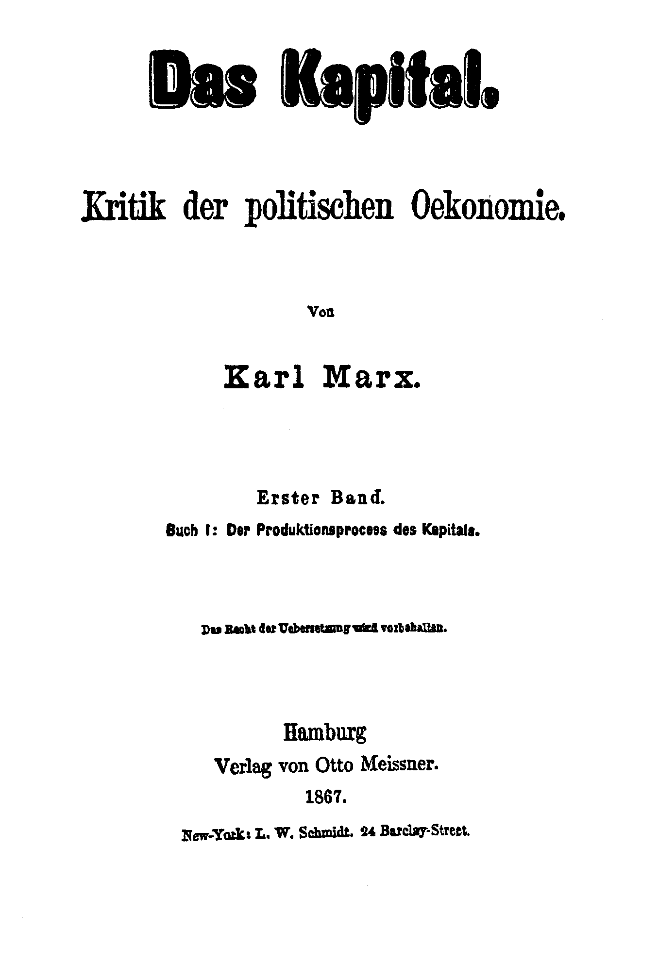 Das Kapital, Karl Marx, Titelseite